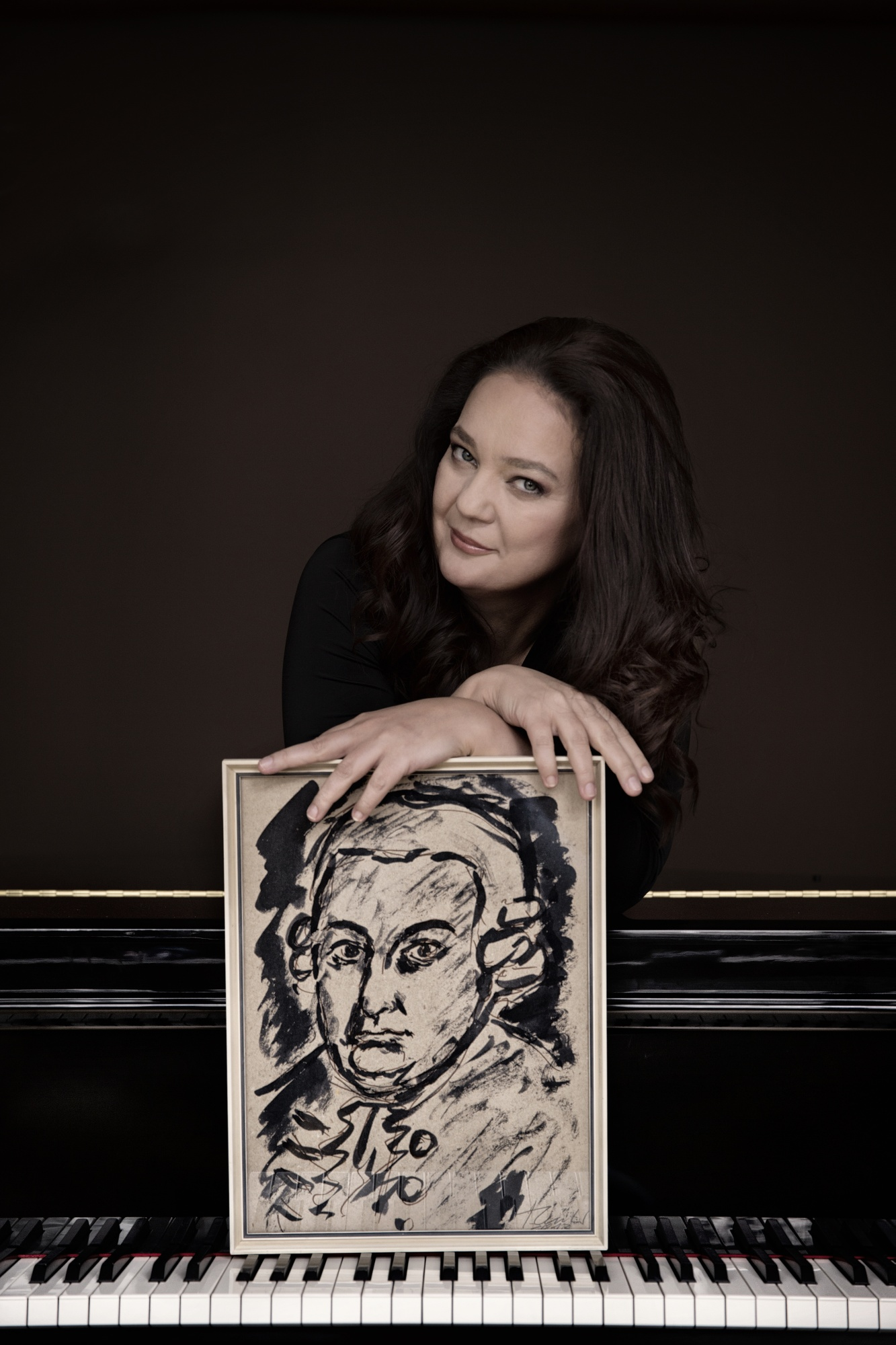 Ana Marija Markovina mit Carl Philipp Emanuel Bach Portrait (gezeichnet von Prof. Dr. Helmut Reuter)